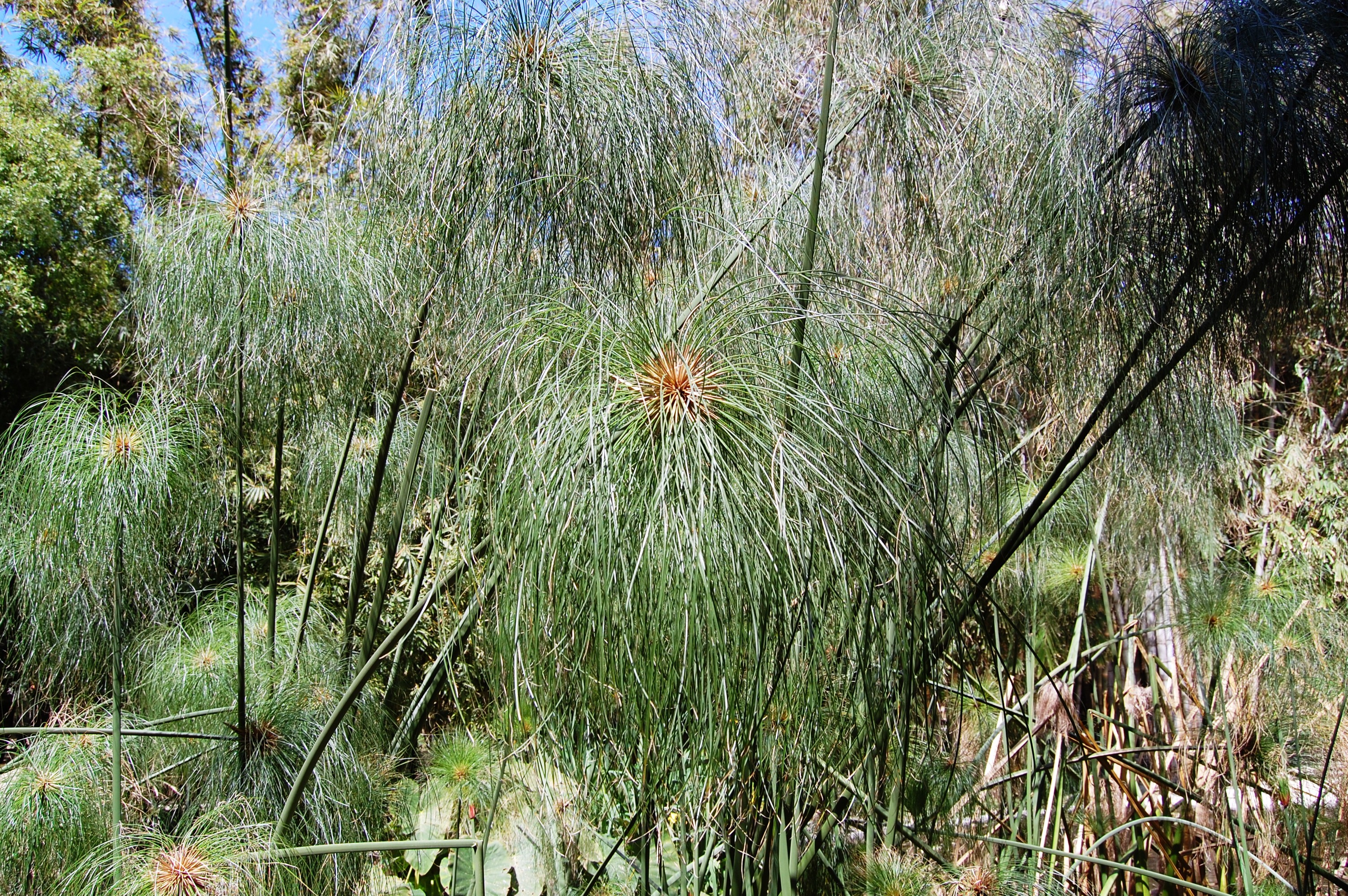 Cyperus papyrus Orto botanico di Palermo